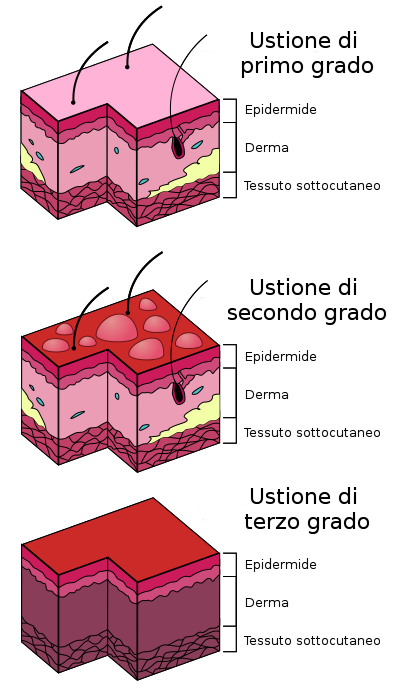 Il diagramma illustra gli effetti dei tre gradi di ustione